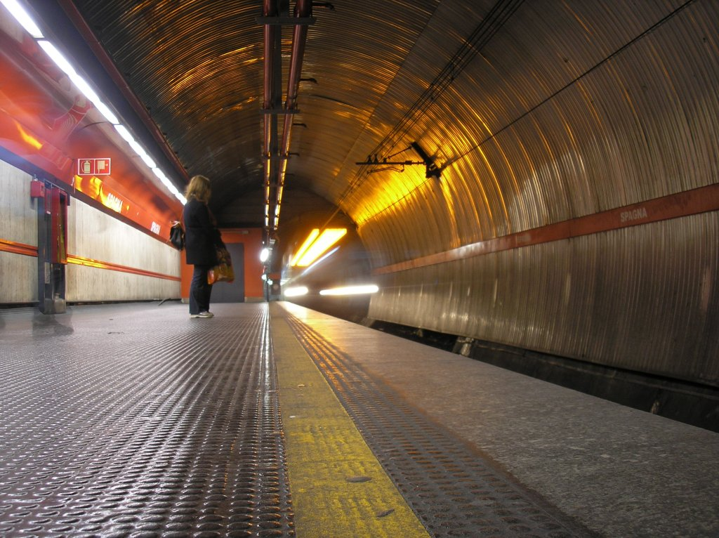 Linea A - Stazione "Spagna". Roma, Lazio, Italia